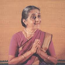 Kalanidhi Narayanan, 1986